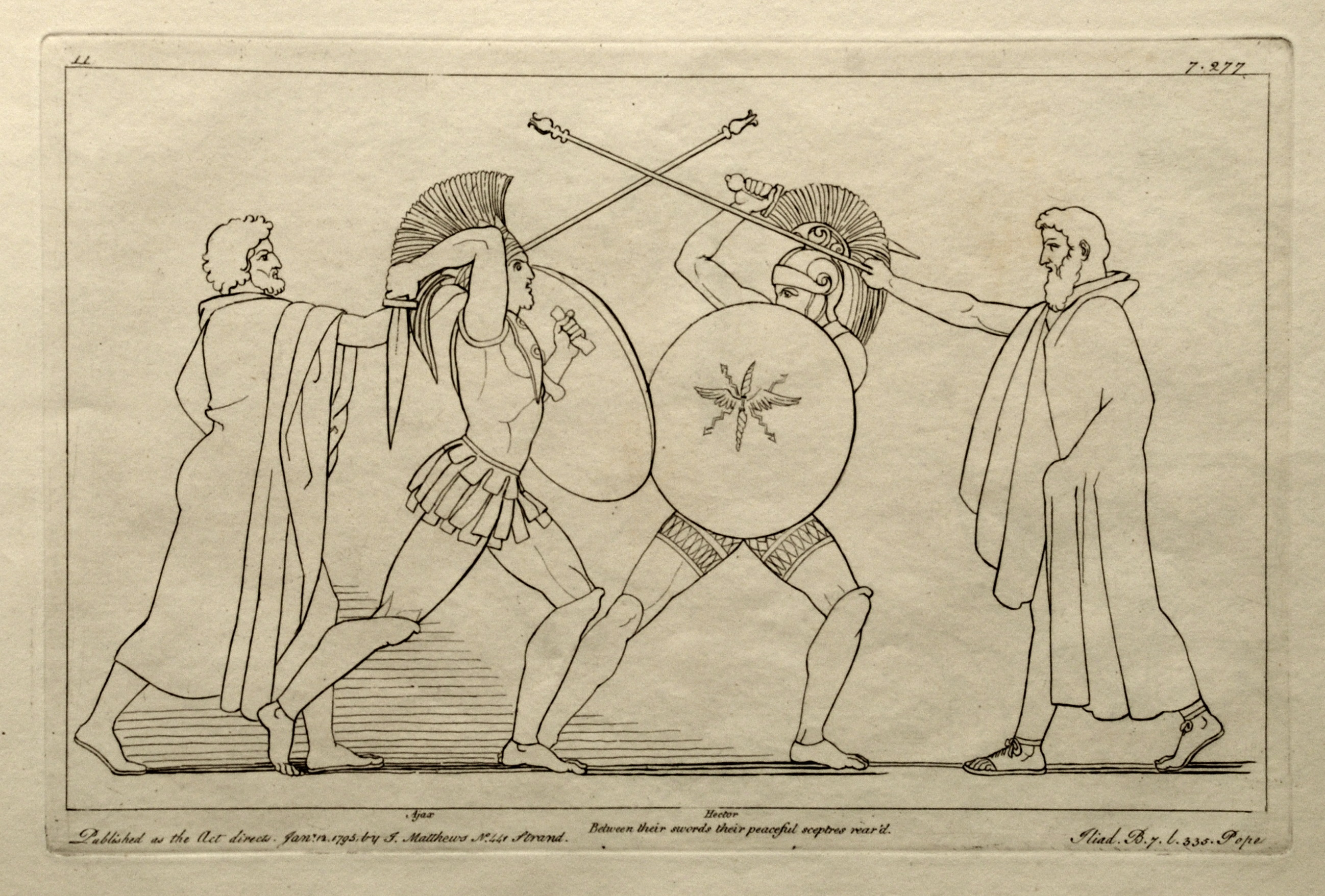 Kupferstich (1795) von Tommaso Piroli (1752 – 1824) nach einer Zeichnung (1793) von John Flaxman (1755 – 1826).